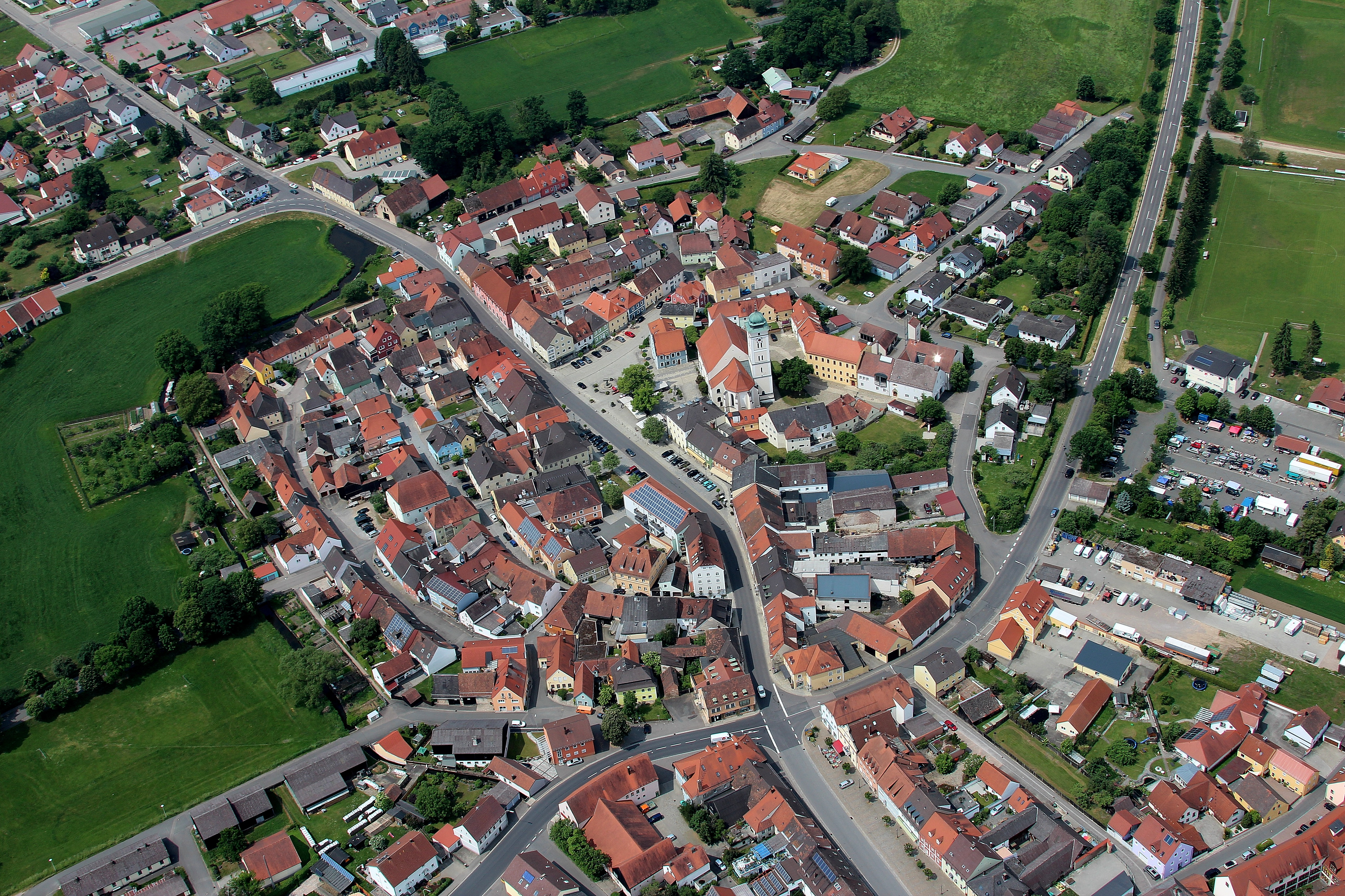 Stadtkern von Pfreimd, Landkreis Schwandorf, Oberpfalz, Bayern